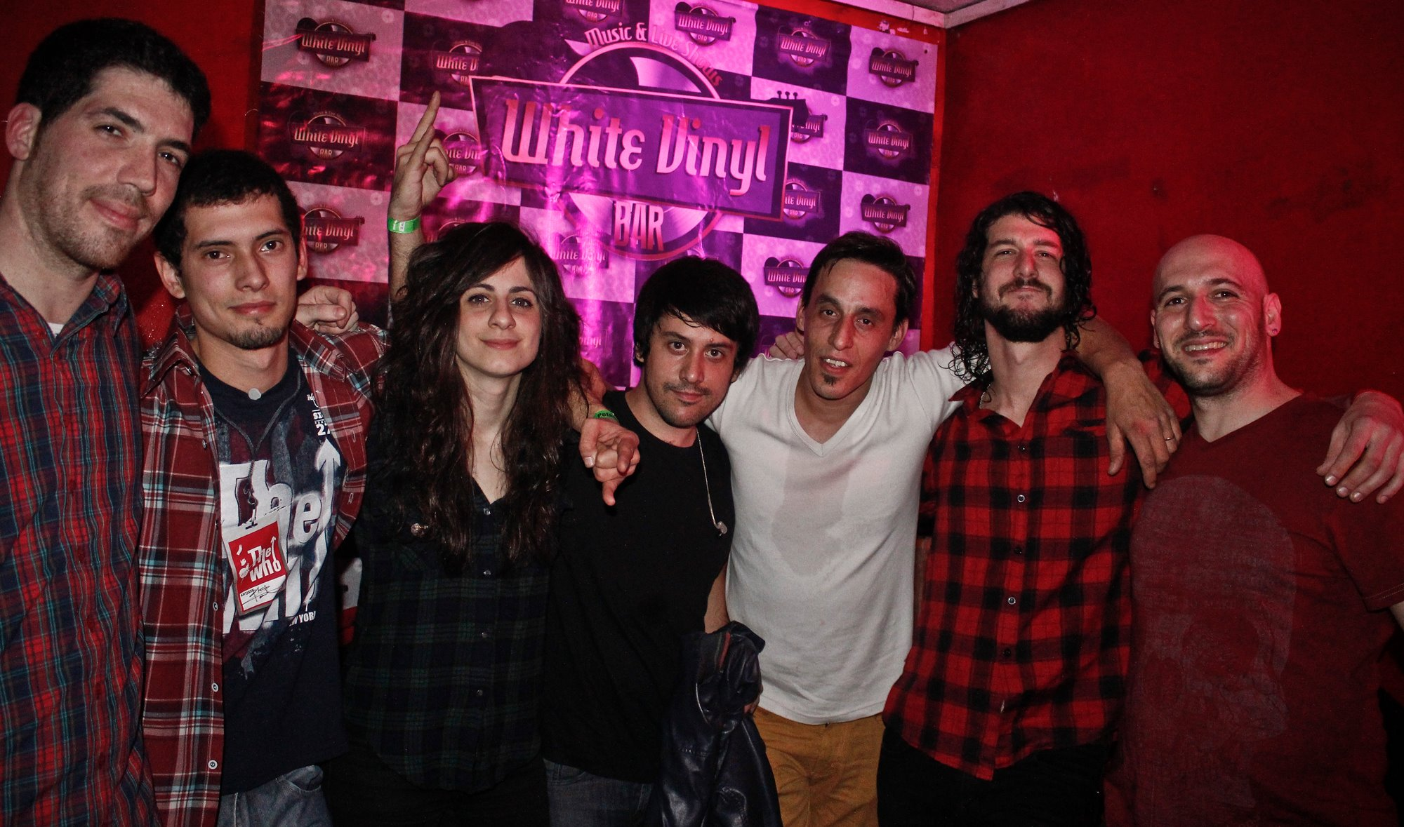 Supermartir y junto a Marilina Bertoldi y Hernan Rúpolo de Connor Questa camarines